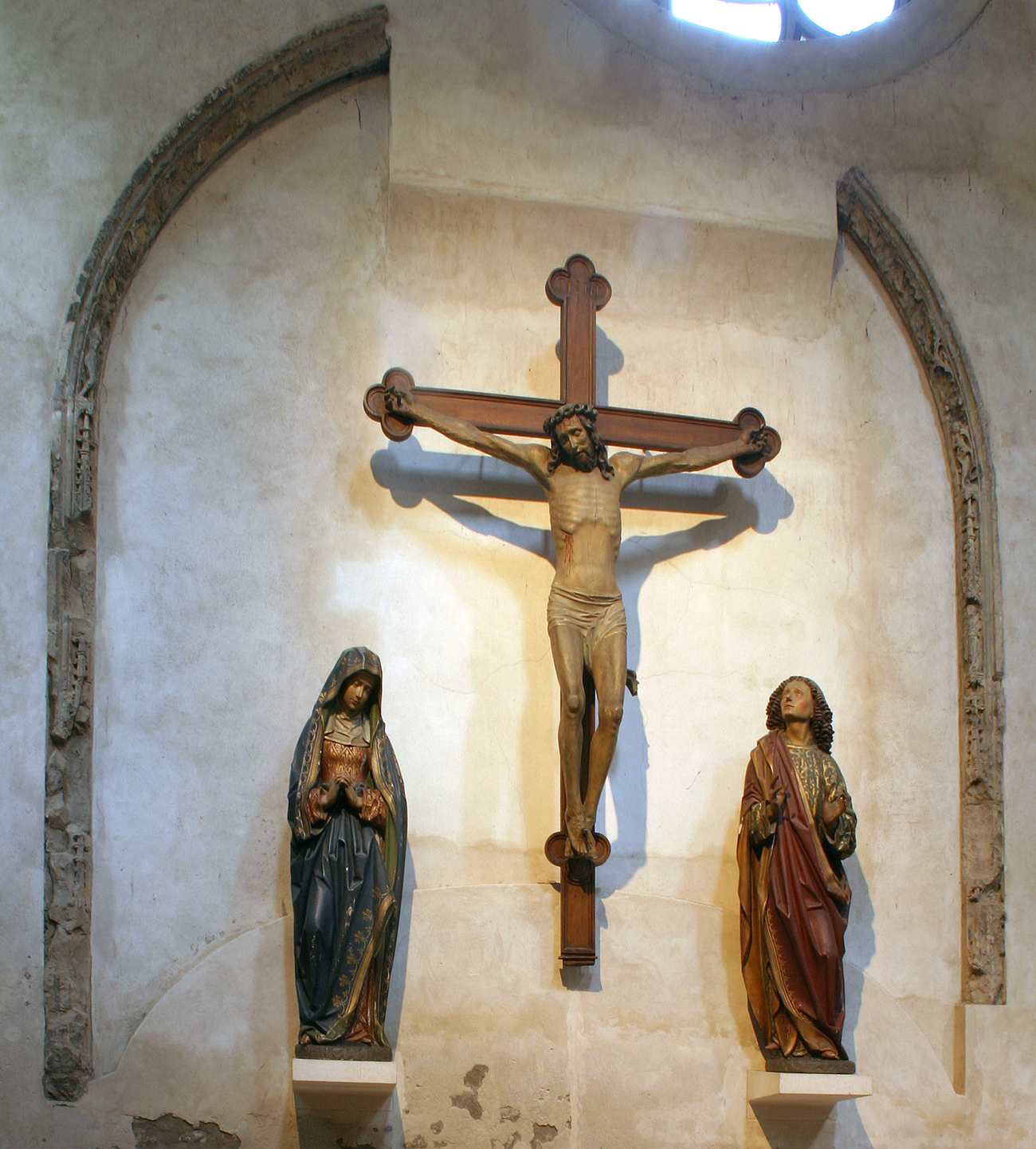 Groß St. Martin, Köln. Kreuzigungsgruppe des Tilman van der Burch, 15./16. Jahrhundert.